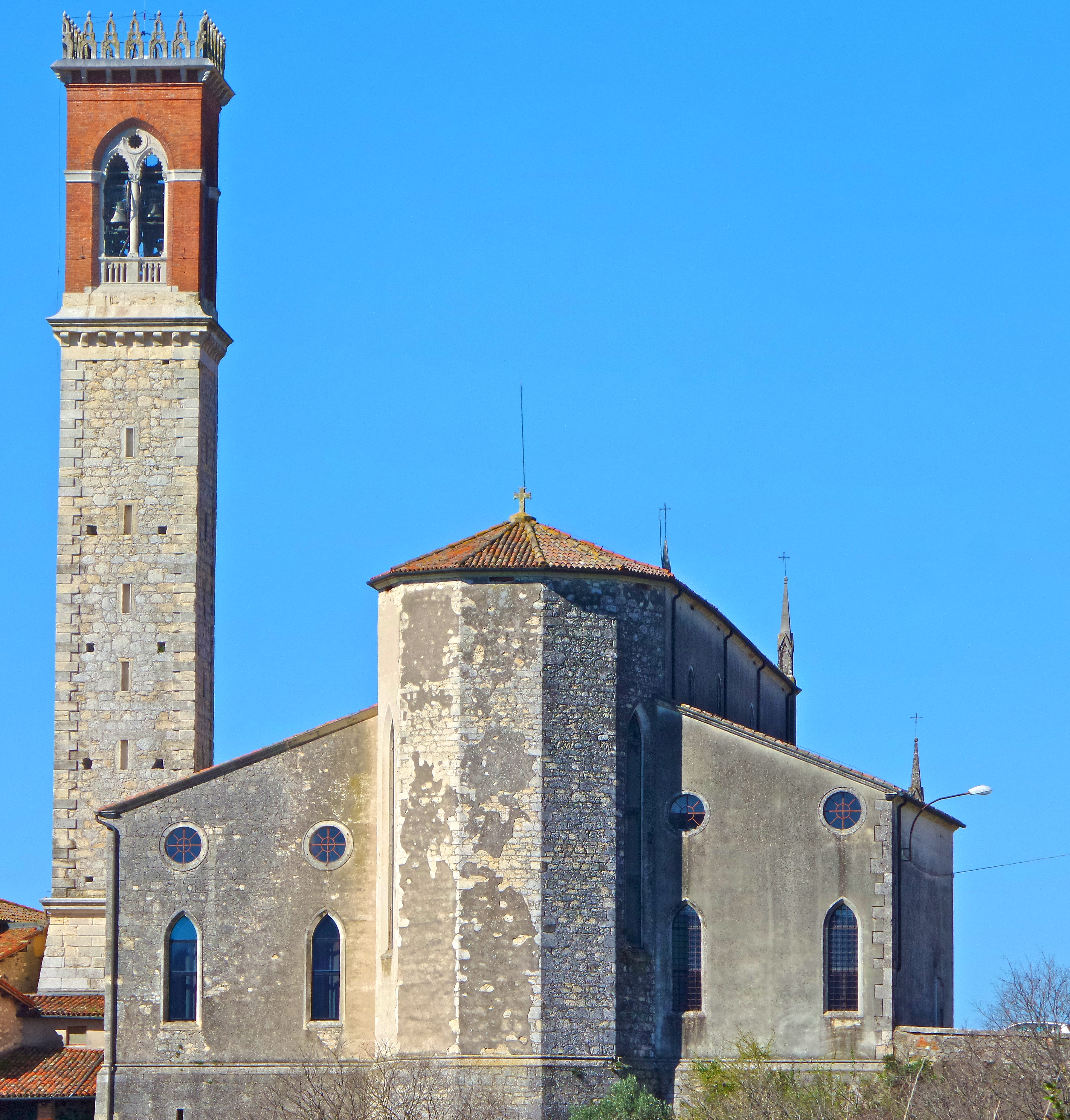 Vista del versante est della chiesa